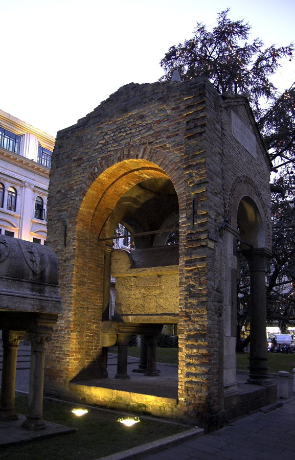 La tomba del leggendario Antenore a Padova